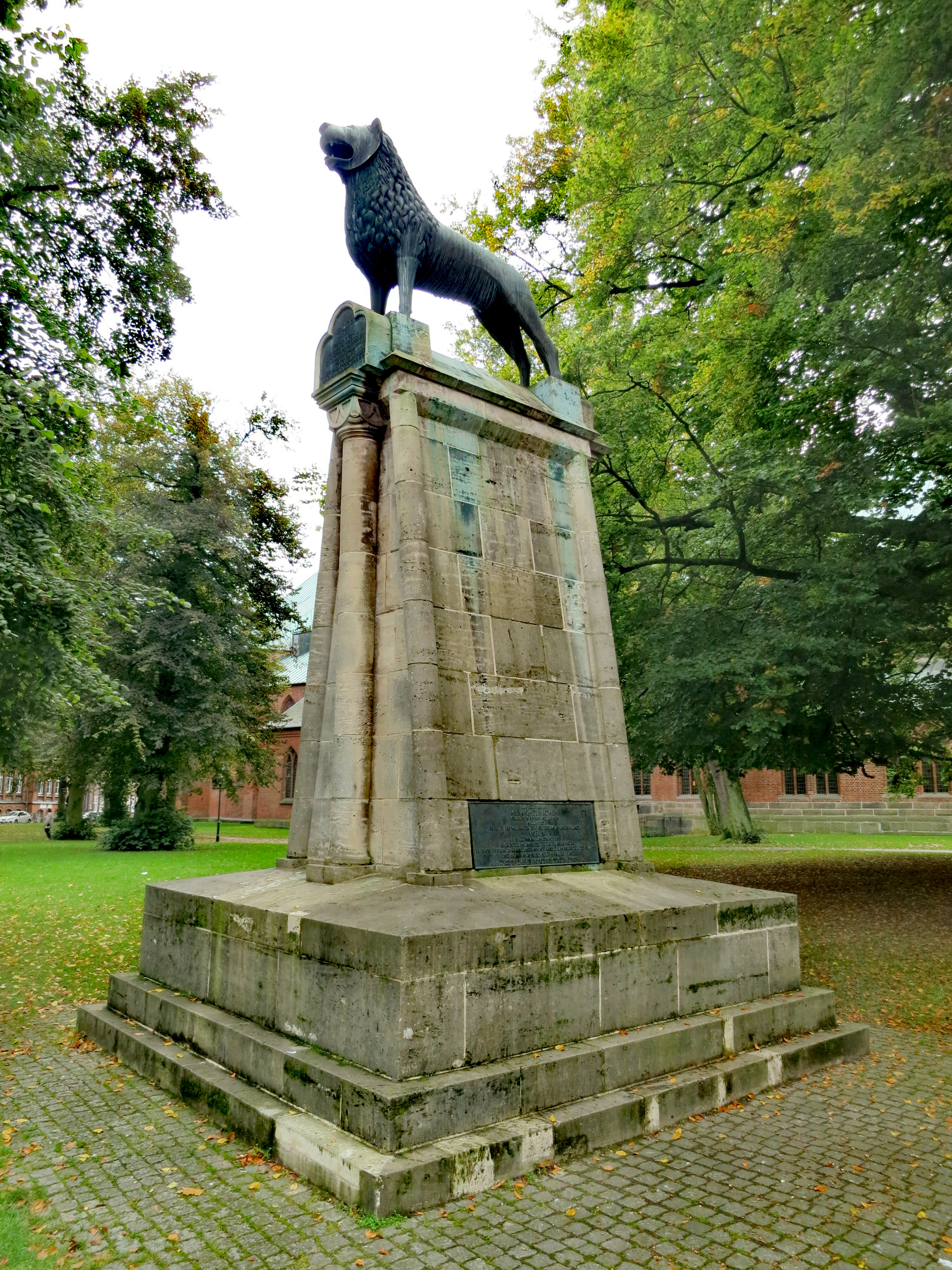 Kopie der Braunschweiger-Löwen-Statue vor dem Lübecker Dom